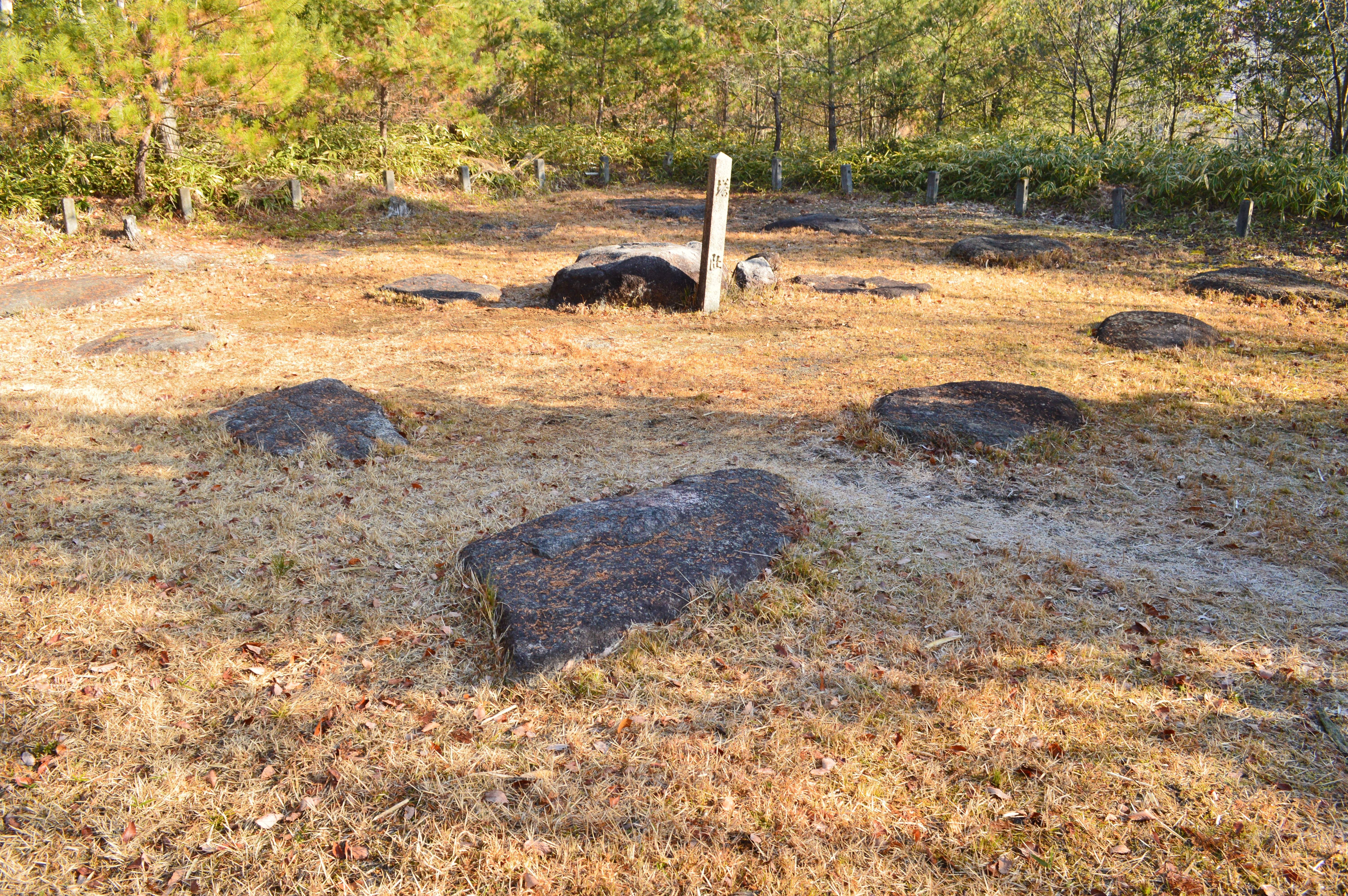 紫香楽宮跡内裏野地区 塔跡